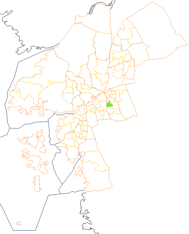 Karta som visar primärområdes belägenhet i Göteborg